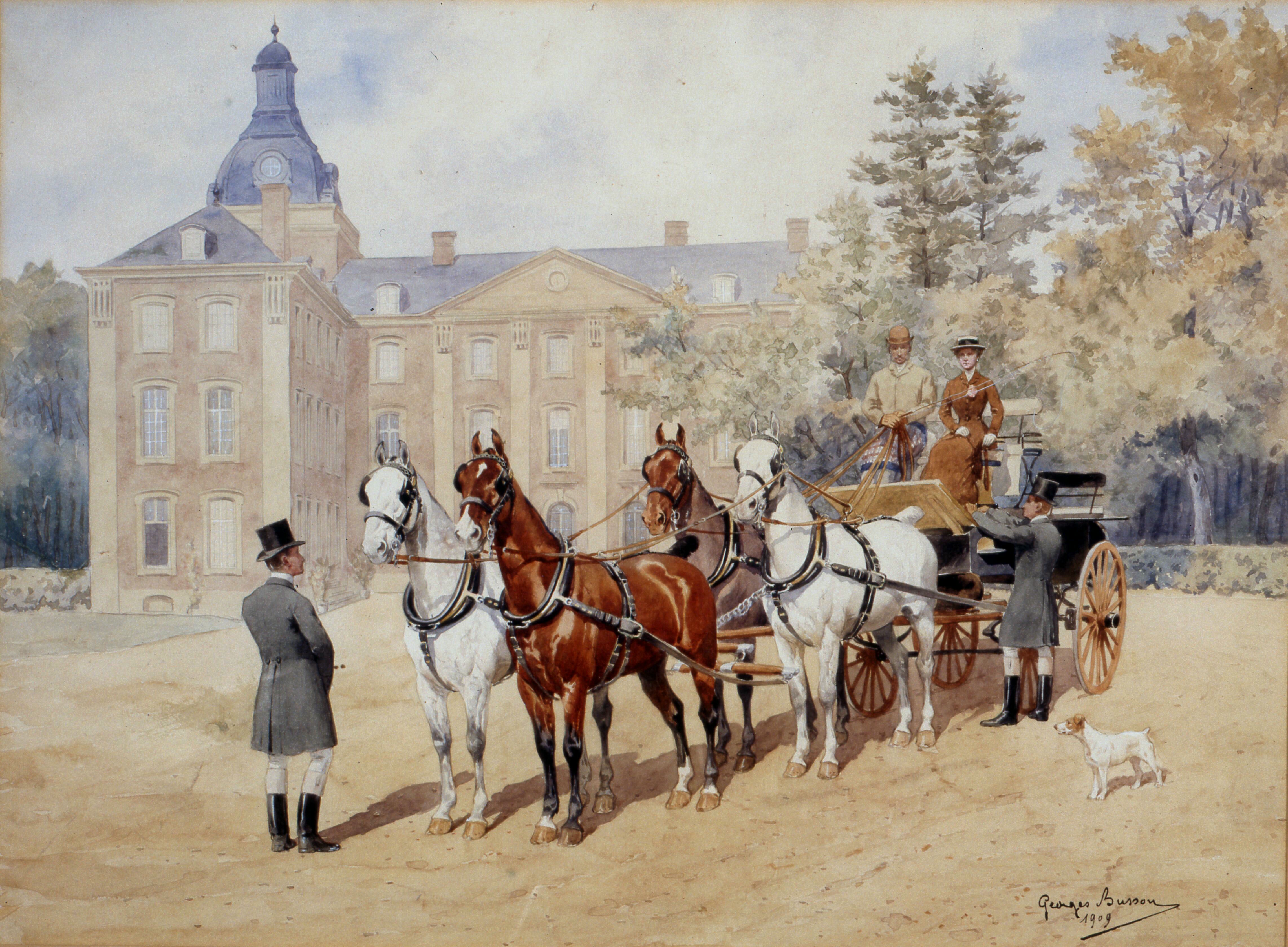 Kasteel Amstenrade: Interieur, aquarel op papier van Georges Busson, voorstellende Arthur de Marchant et d'Ansenbourg en zijn vrouw op een vierspan met kasteel Amstenrade op de achtergrond (opmerking: Gefotografeerd voor Wonen in Arcadië, bladzijde 78, afbeelding 43)